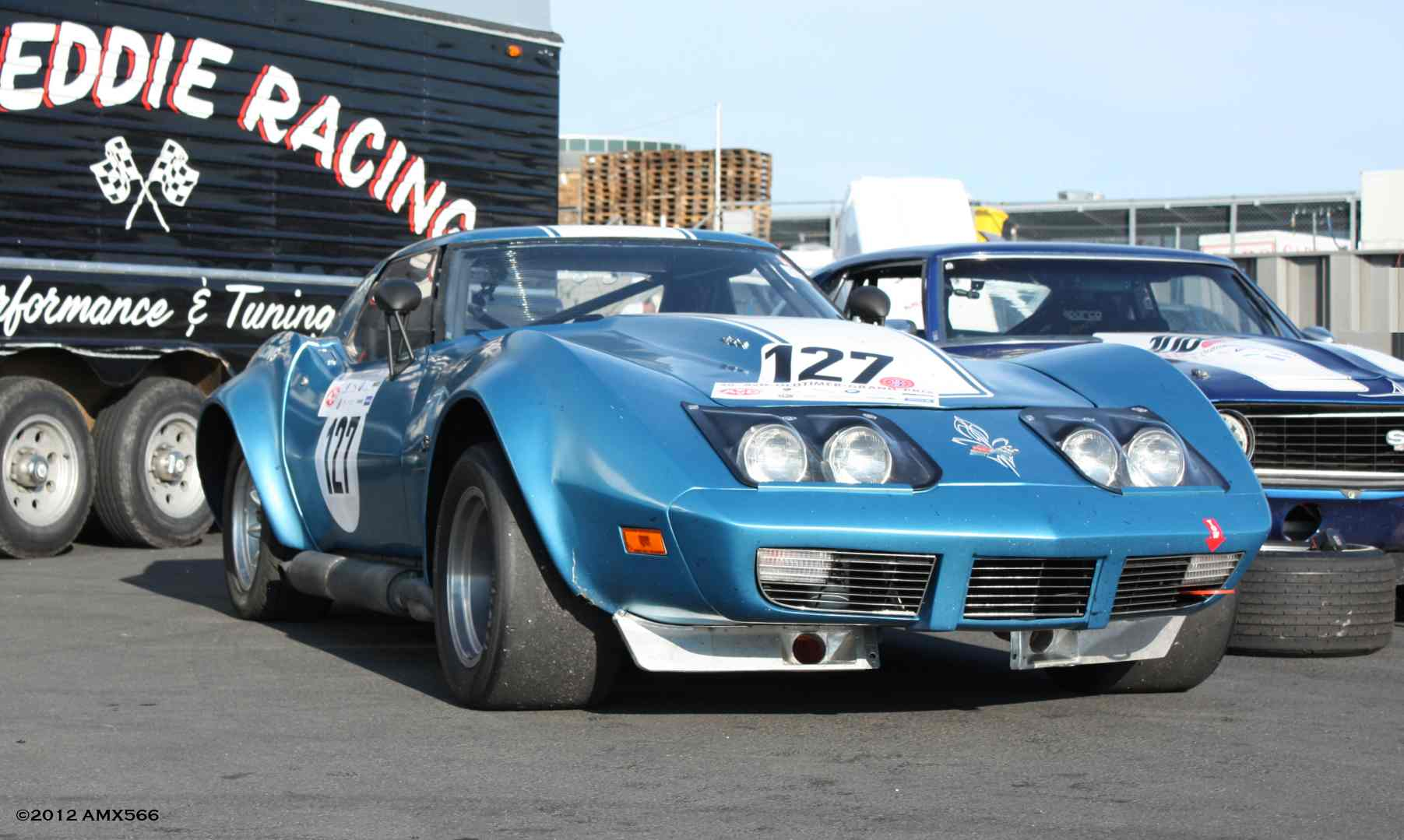 Racing Chevrolet Corvette